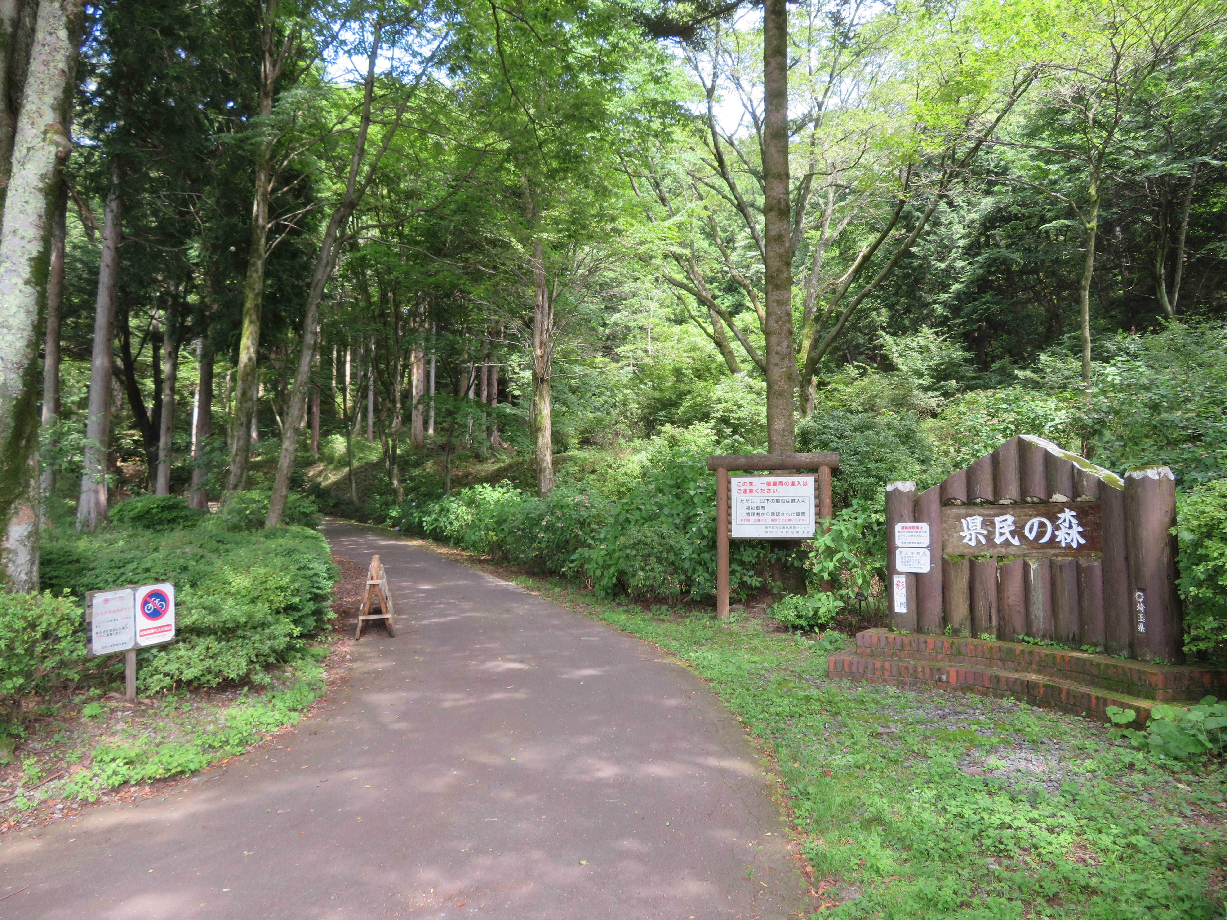 埼玉県横瀬町に所在する県民の森（林道丸山線沿いの入口付近を撮影）